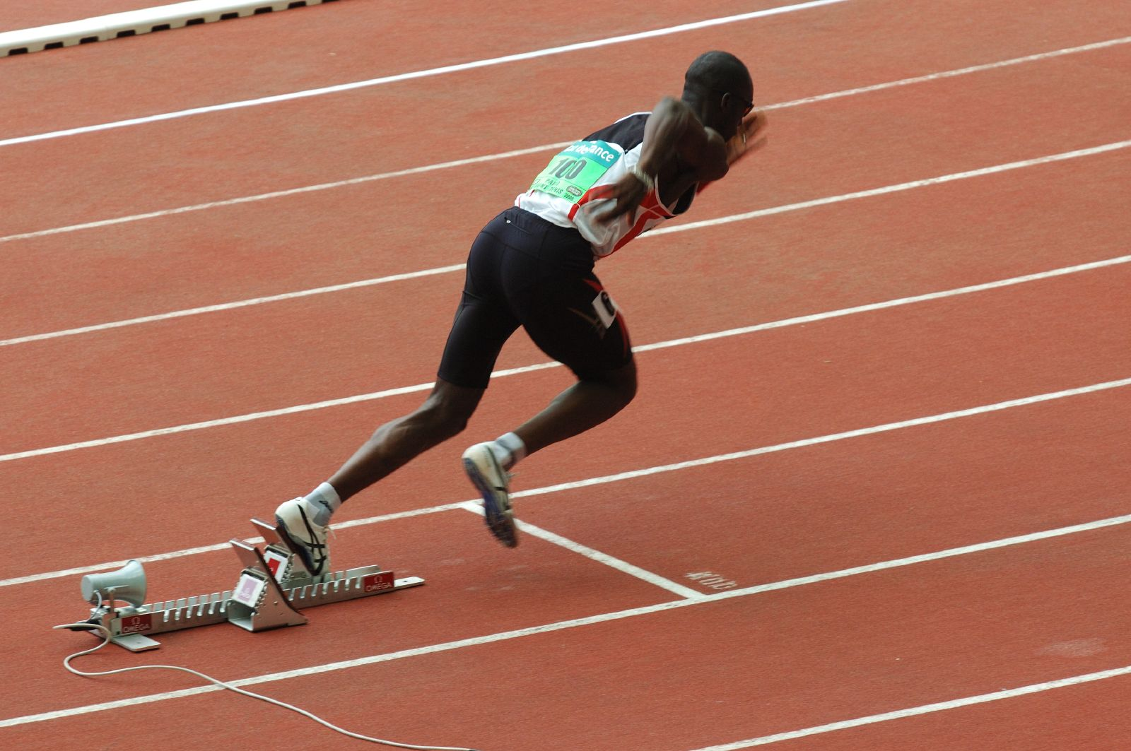 Leslie Djhone, Golden League 2006, Gaz de France, Paris Saint-Denis.